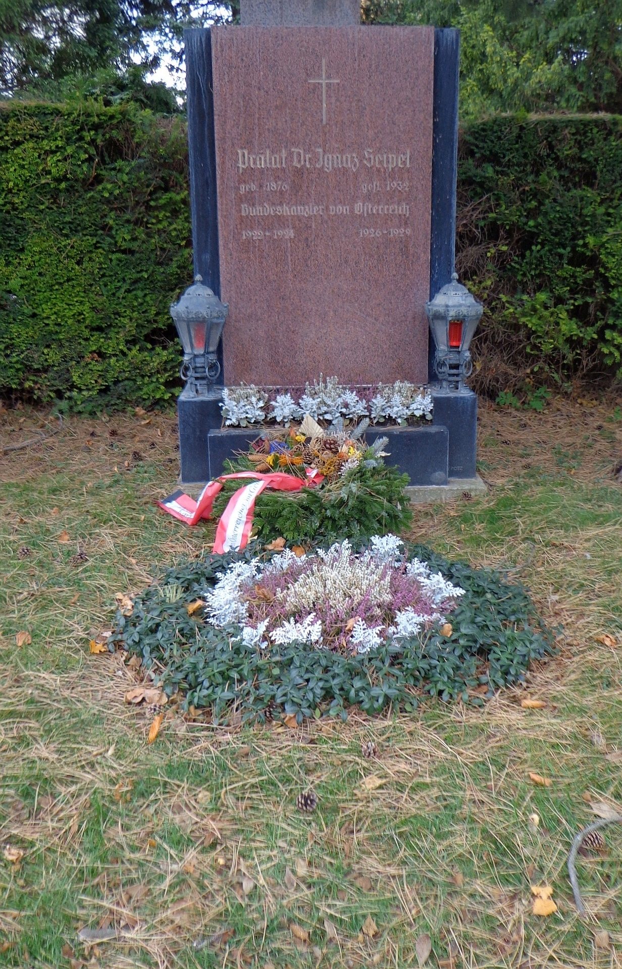 Wiener Zentralfriedhof - Gruppe 14 C, Ehrengrab von Ignaz Seipel